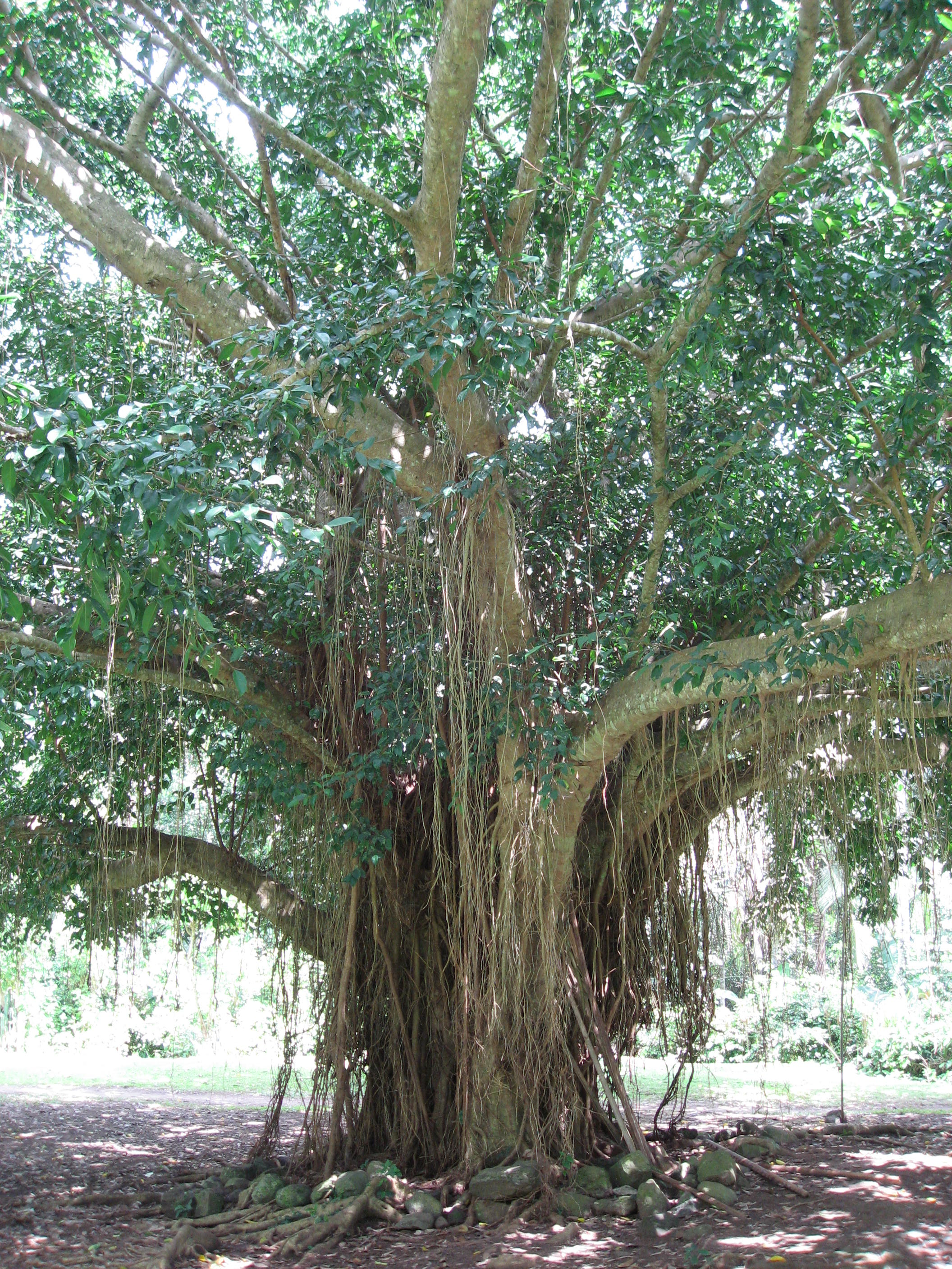 First Banyan (Ficus benghalensis) in Tenganan